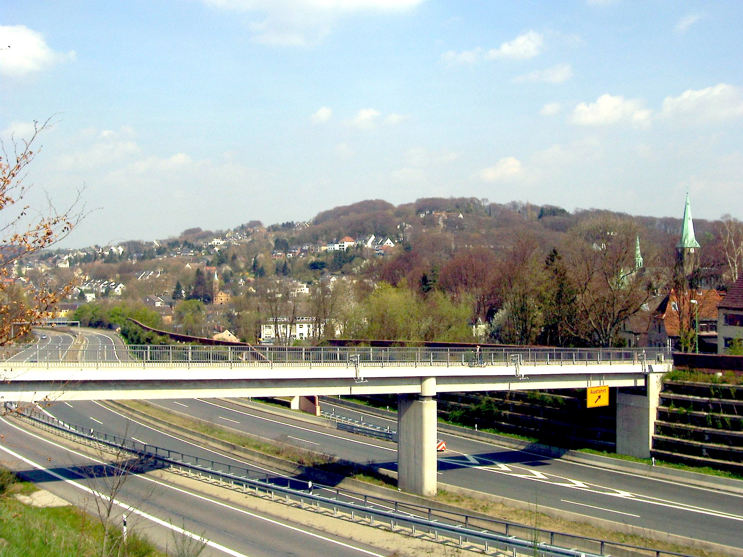 Essen-Kupferdreh von der Dilldorfer Höhe aus